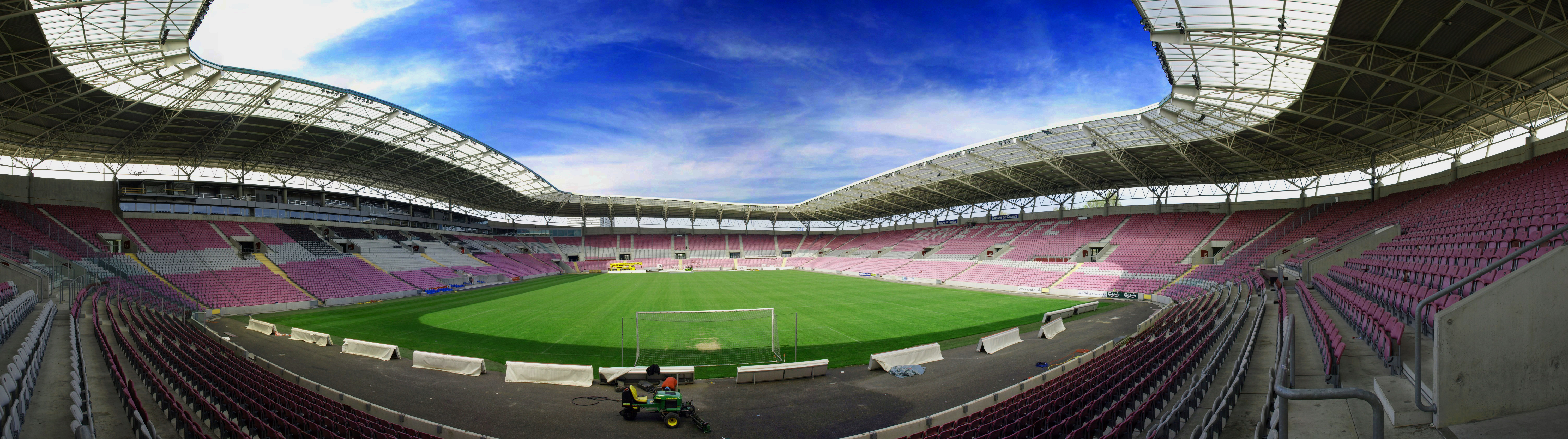 Ein Panorama-Bild des Stade de Genève